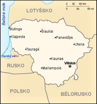 Orientační mapa Litvy.